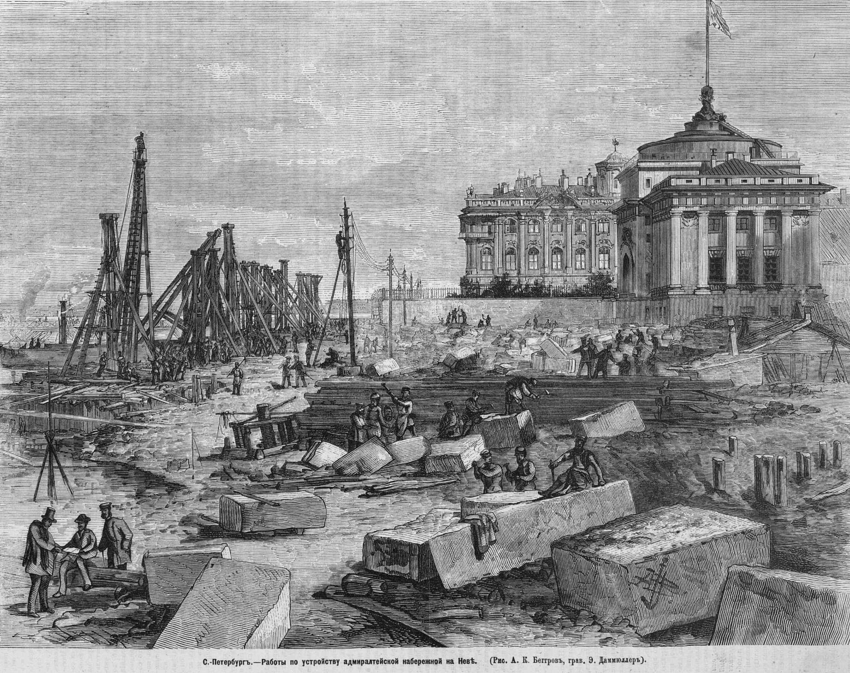 Устройство Адмиралтейской набережной, 1873 год